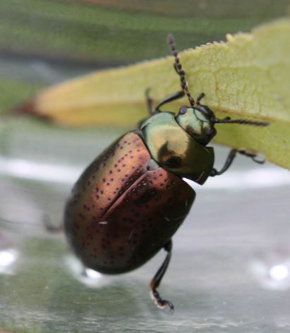 Chrysolina hyperici am 11.10.2017 in der Schwetzinger Hardt